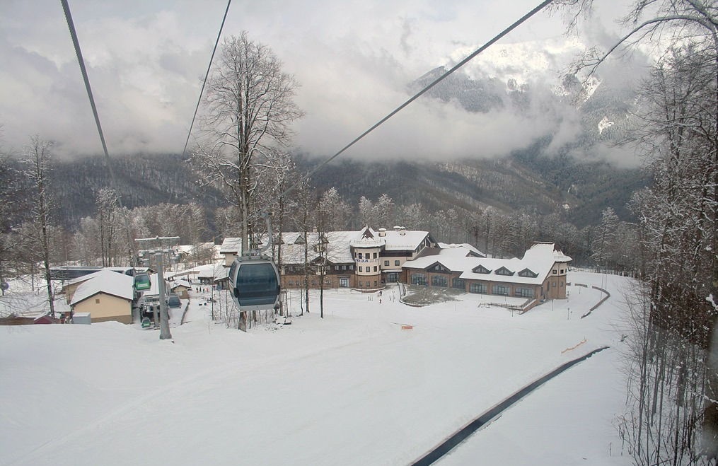 Ski Area Resort Rosa Khutor